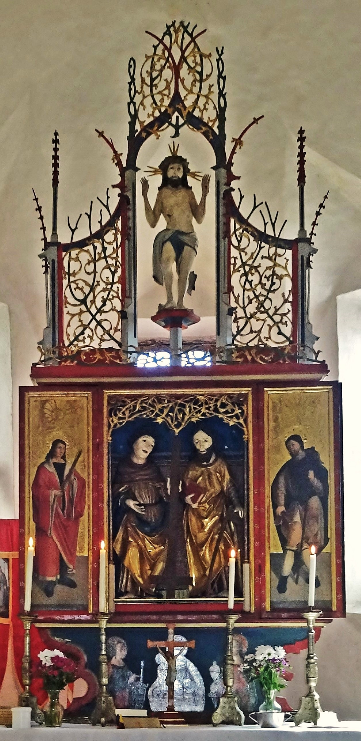 Kath. Filialkirche Hll. Philipp und Jakob Pichlern (Himmelberg)